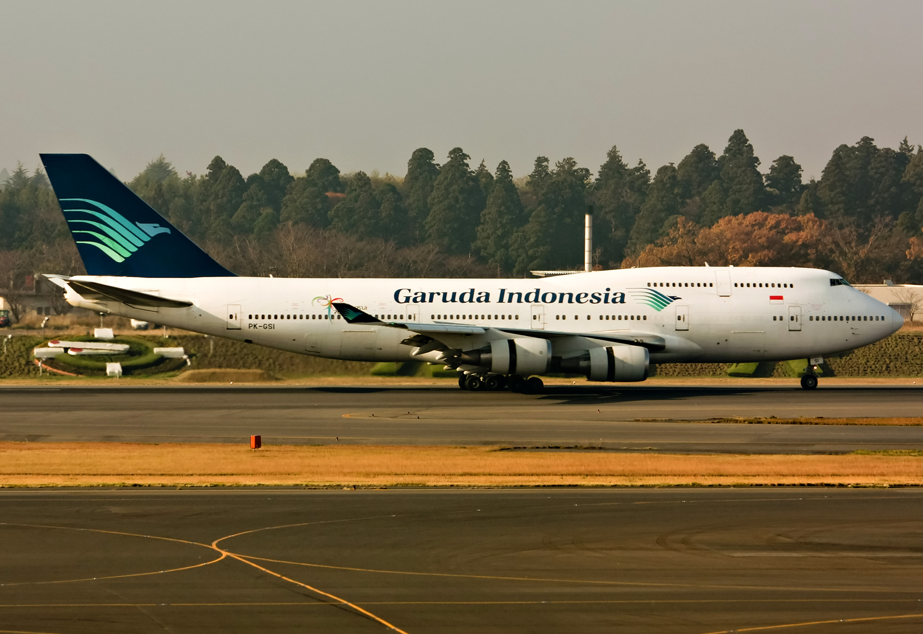 Boeing:747-441 SN:24956/917 Ex.: Varig - PP-VPG ILFC - N791LF